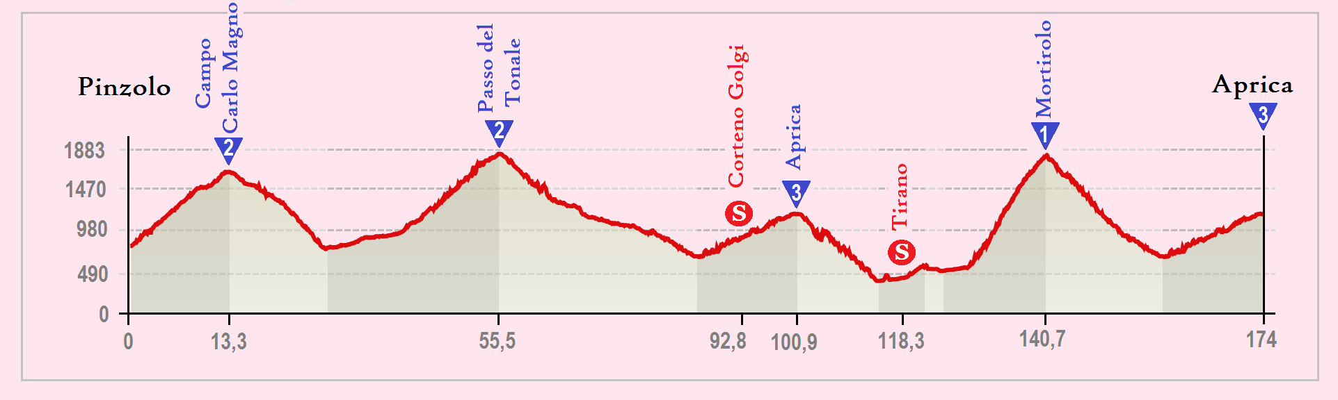 Perfil de la 16.ª etapa del Giro de Italia 2015